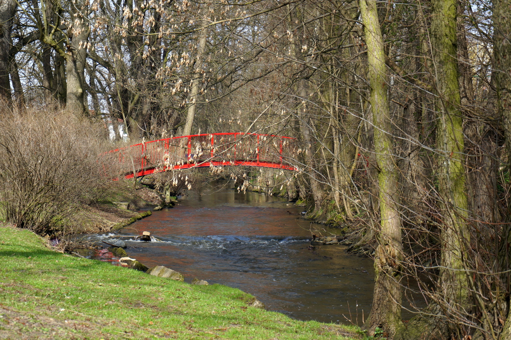 Gorzów Wlkp. Kładka na Kłodawce prowadząca do obiektów AZS AWF. Widok od strony zieleńca (do 1945 r. "Klosepark", założony w końcu XIX w przez Friedricha Klosego)